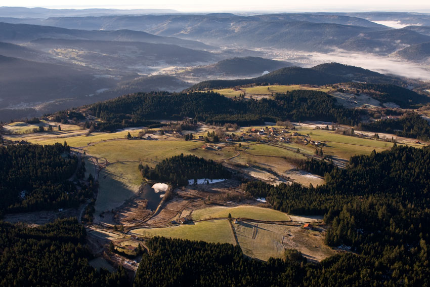 Village du Haut du Tôt vu du ciel.